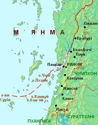 Мапа провінції Ранонг